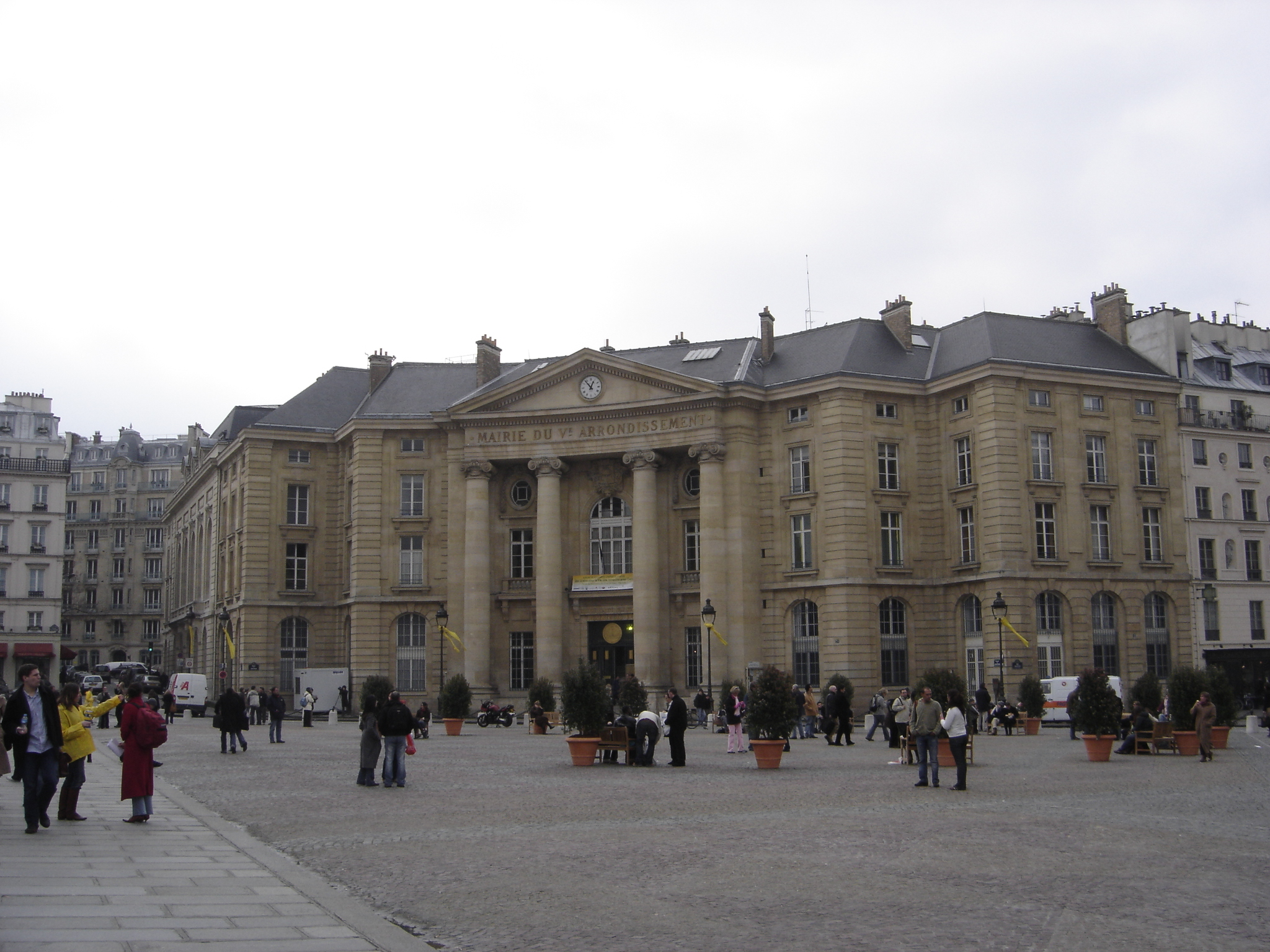 Paris - Mairie du 5ème arrondissement